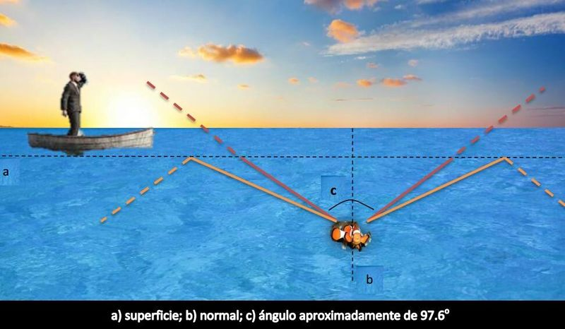 Vista de un pez